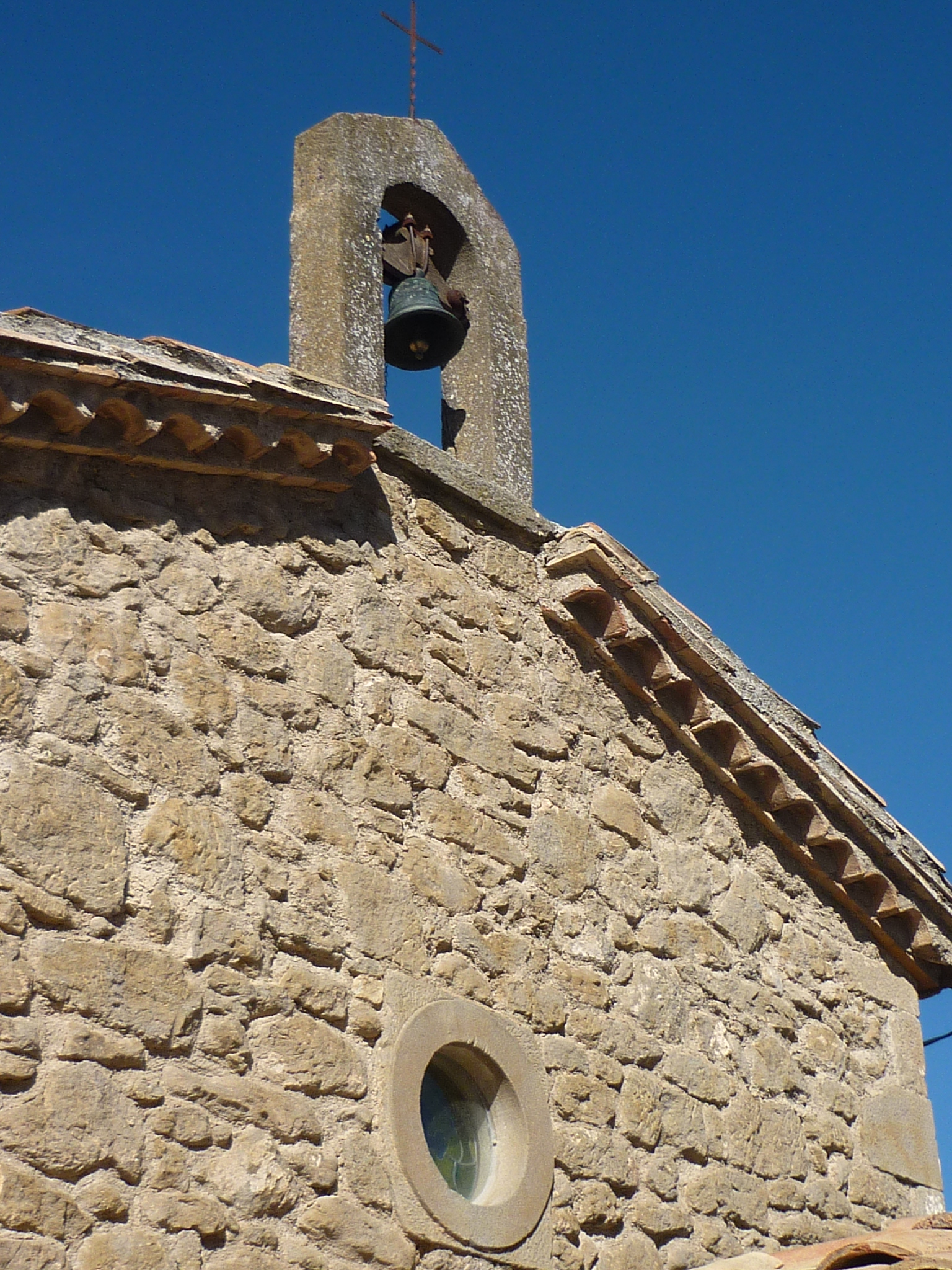 Capella de Sant Bernat (Solsona): òcul i espadanya